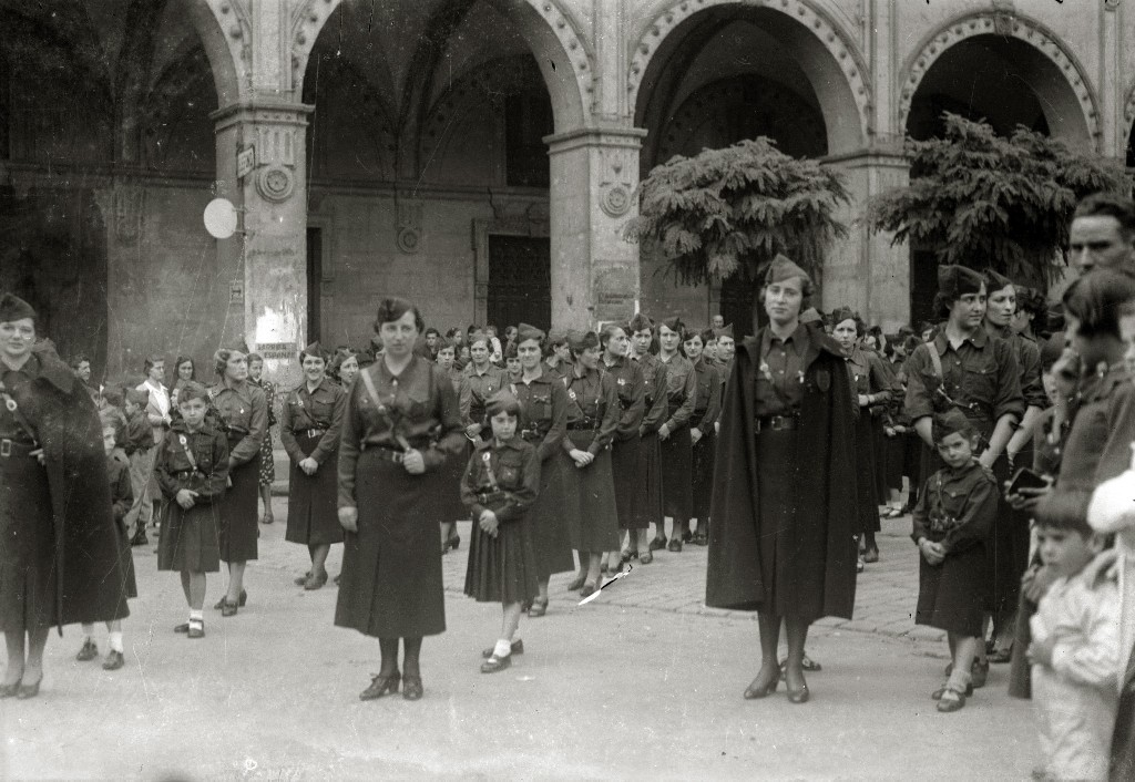 Título original: Entrada de las tropas nacionales en San Sebastián (6/54) Localización: San Sebastián (Guipúzcoa)